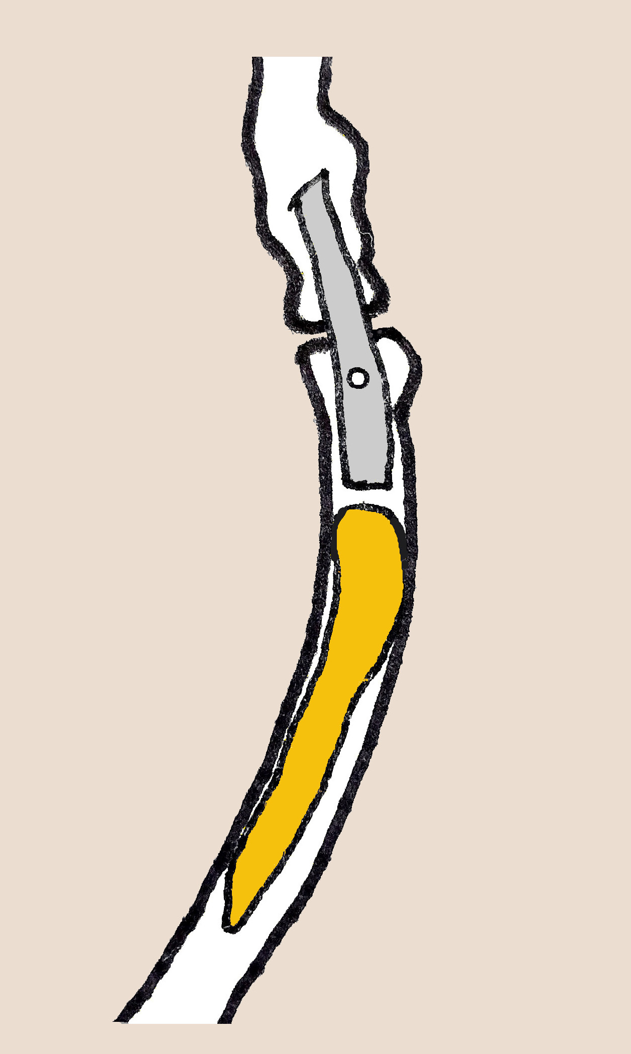 Goldschatz von Erstfeld Einsatz in drei Halsringen nach einer Skizze in Martin A. Guggisberg: "Drei "Goldbarren" im Schatz von Erstfeld".